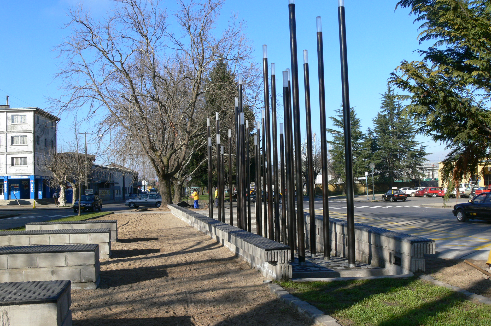 Memorial conmemorativo de la violación de los DDHH en Chile durante el régimen de Pinochet